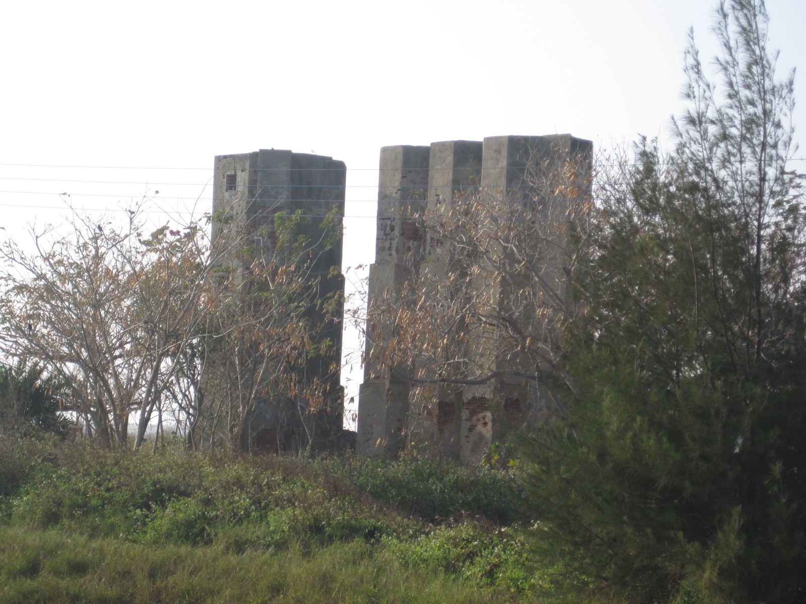 南日本化學工業株式會社溴素工廠位在臺南市北門區的磚塔遺跡